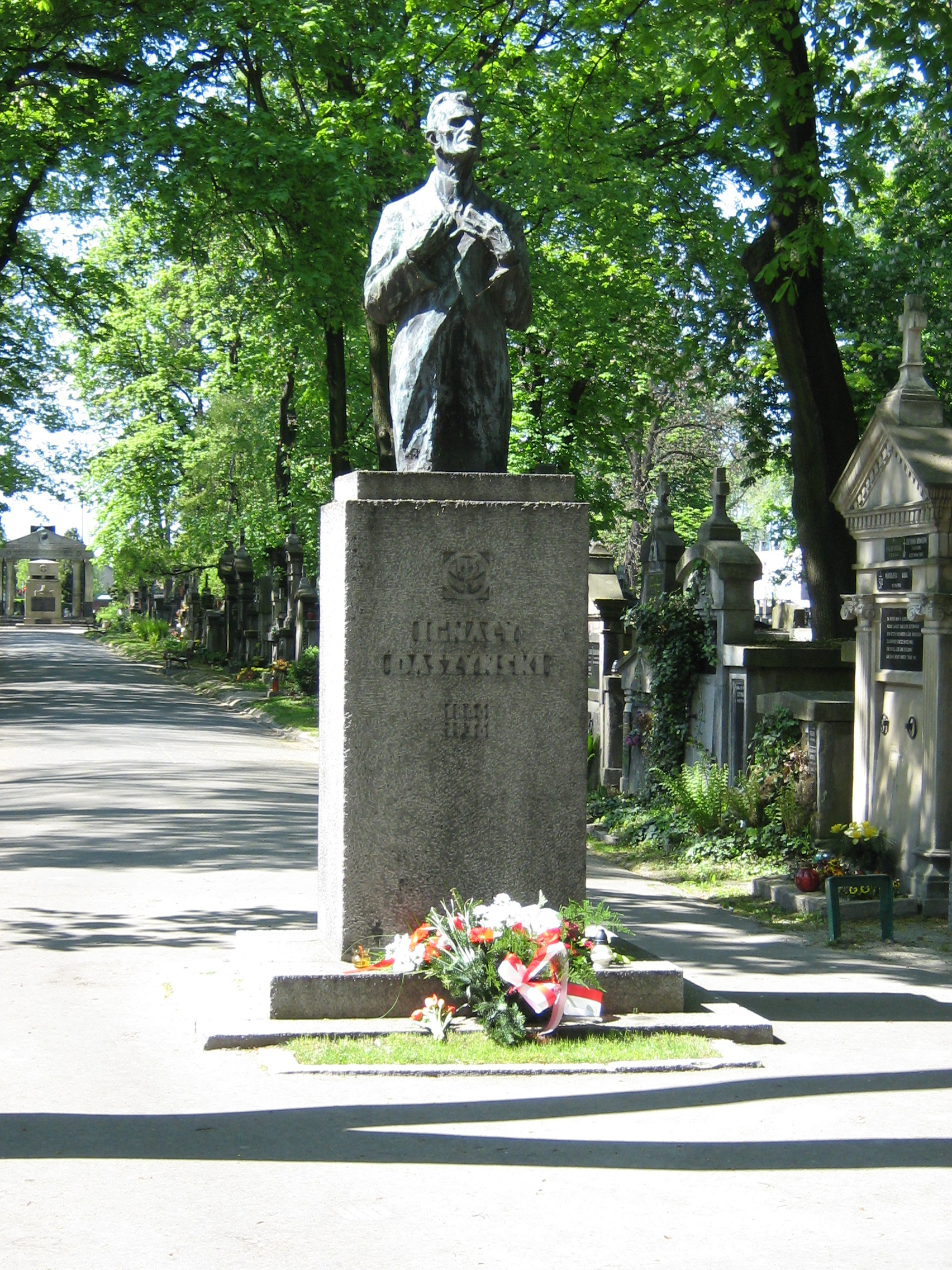 Grób Ignacego Daszyńskiego na Cmentarzu Rakowickim w Krakowie